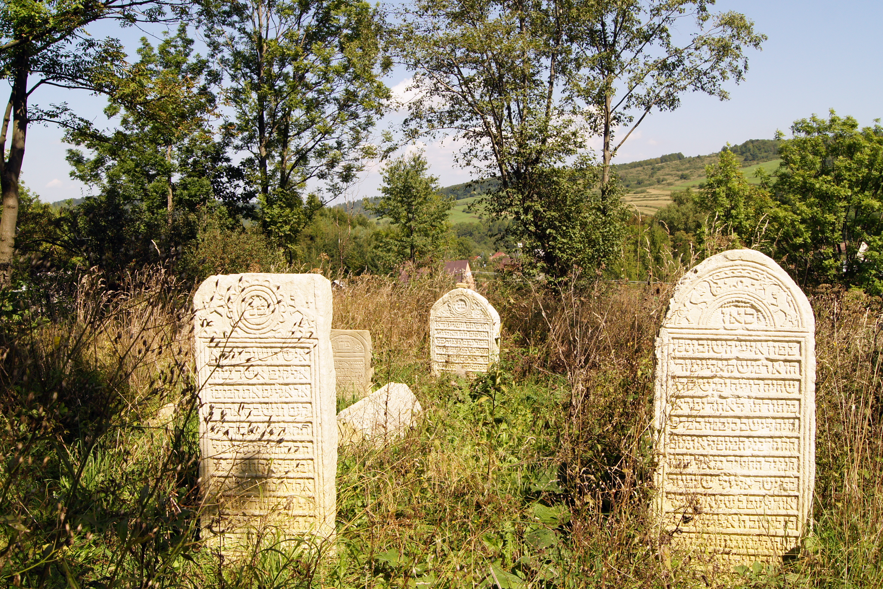 cmentarz żydowski, XIX/XX